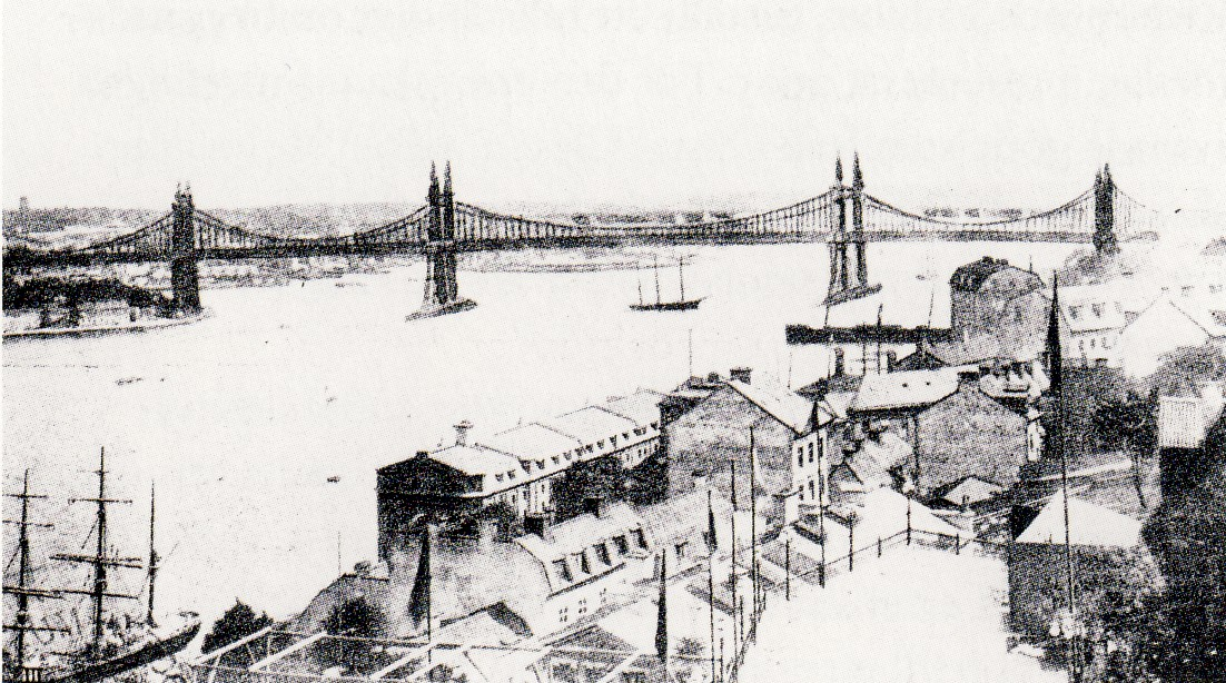 Förslag till en Österbro över Saltsjön, fotomontage från 1906